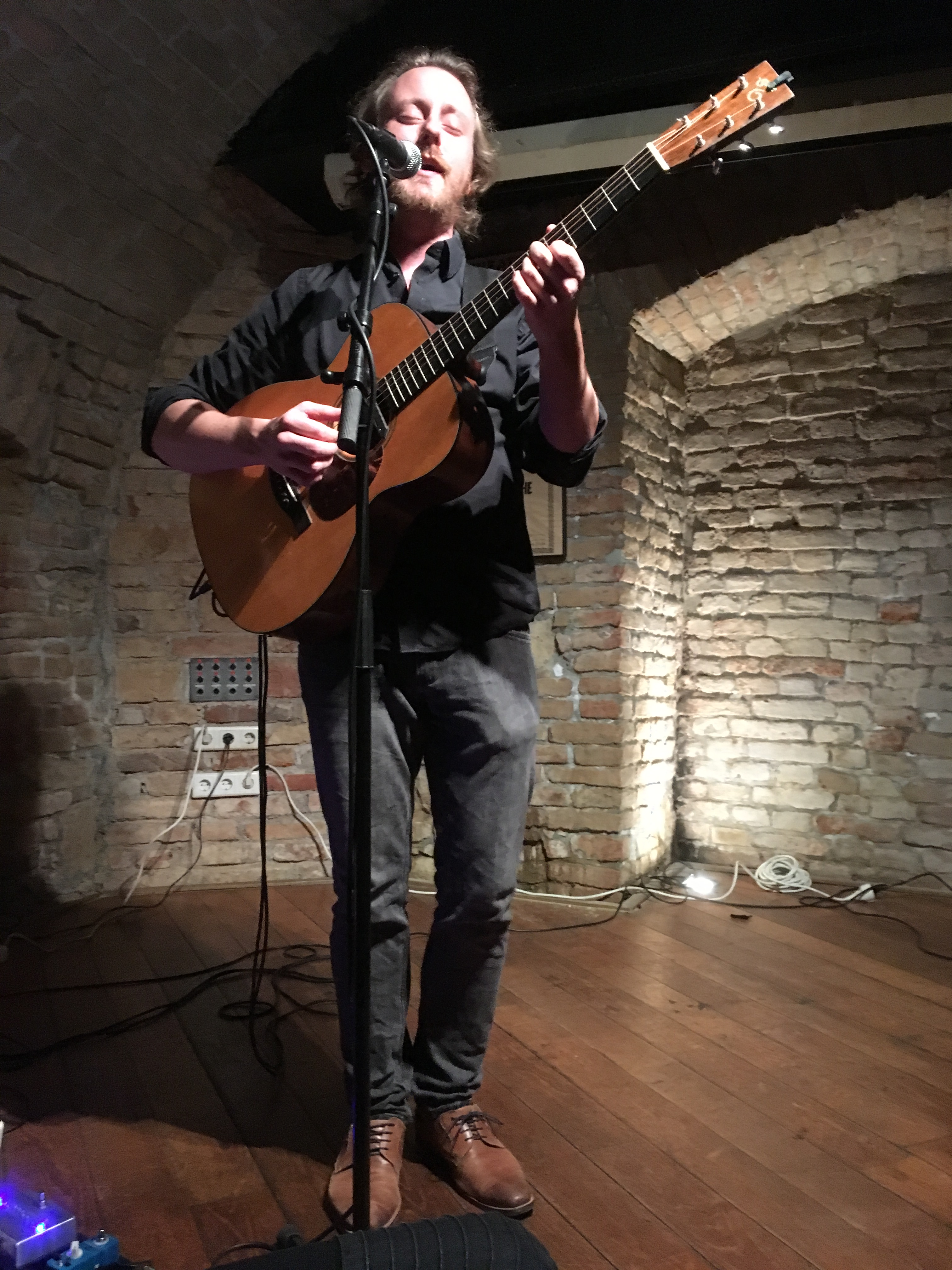 Markus Schlesinger Wien bei seinem Wien-Konzert in der "Fromme Helene" am 9.11.2018